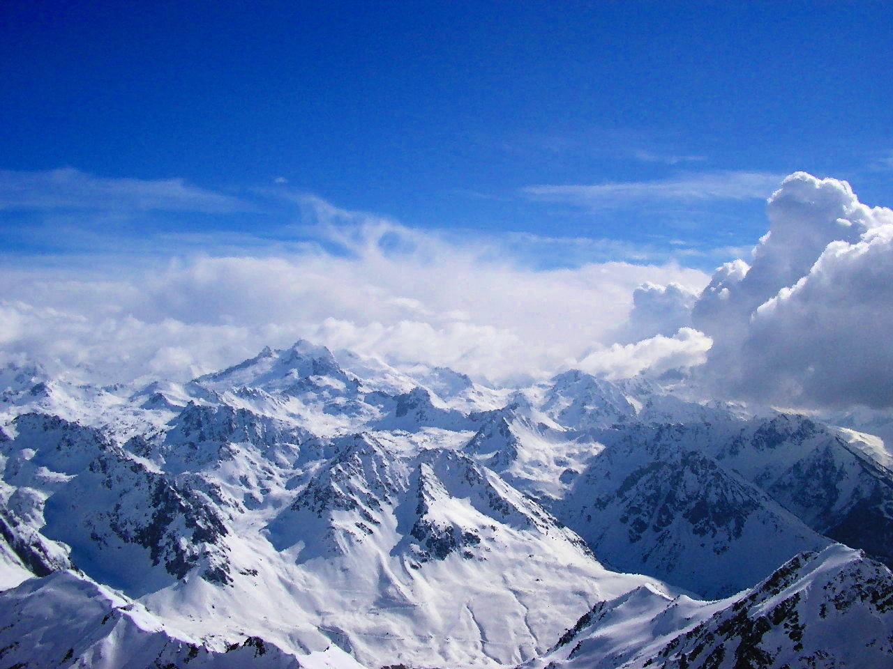 эмблема портала Горы